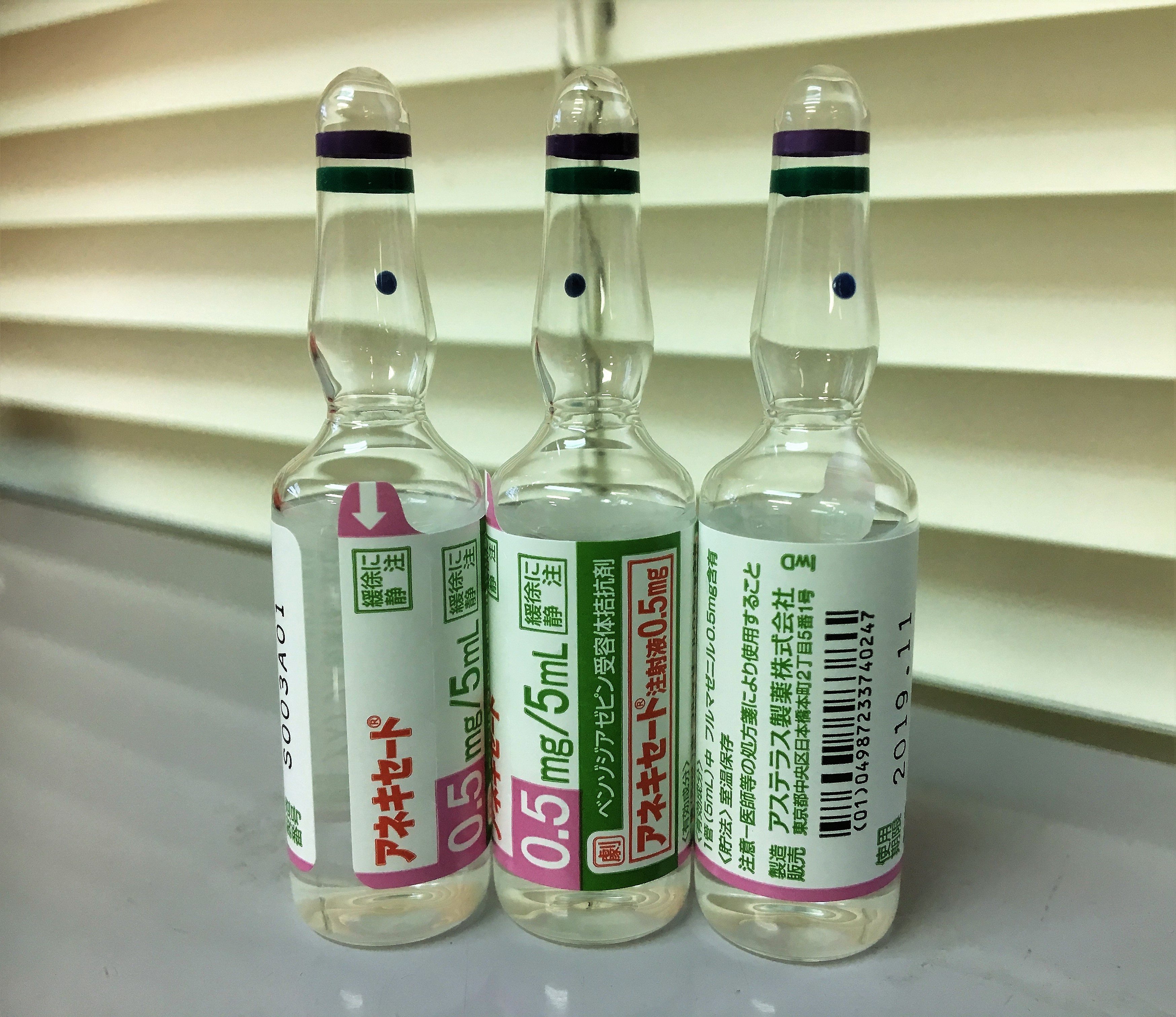 アステラス製薬 アネキセート(成分名フルマゼニル）